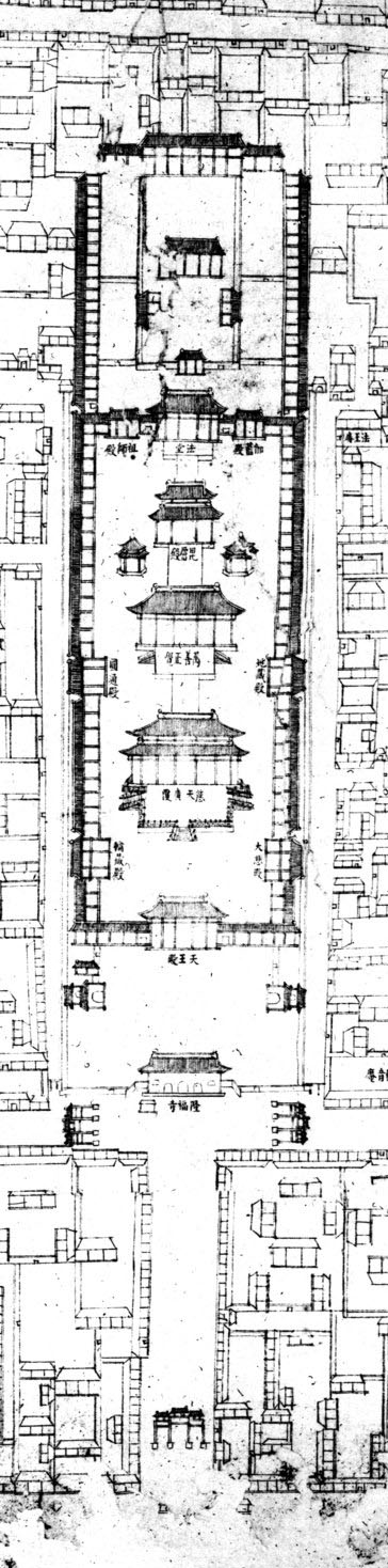 乾隆十五年（1750年）完成的《乾隆京城全图》中的隆福寺。本图来自清內務府藏京城全圖，故宮博物院影印，民國二十九年十二月（1940年）。